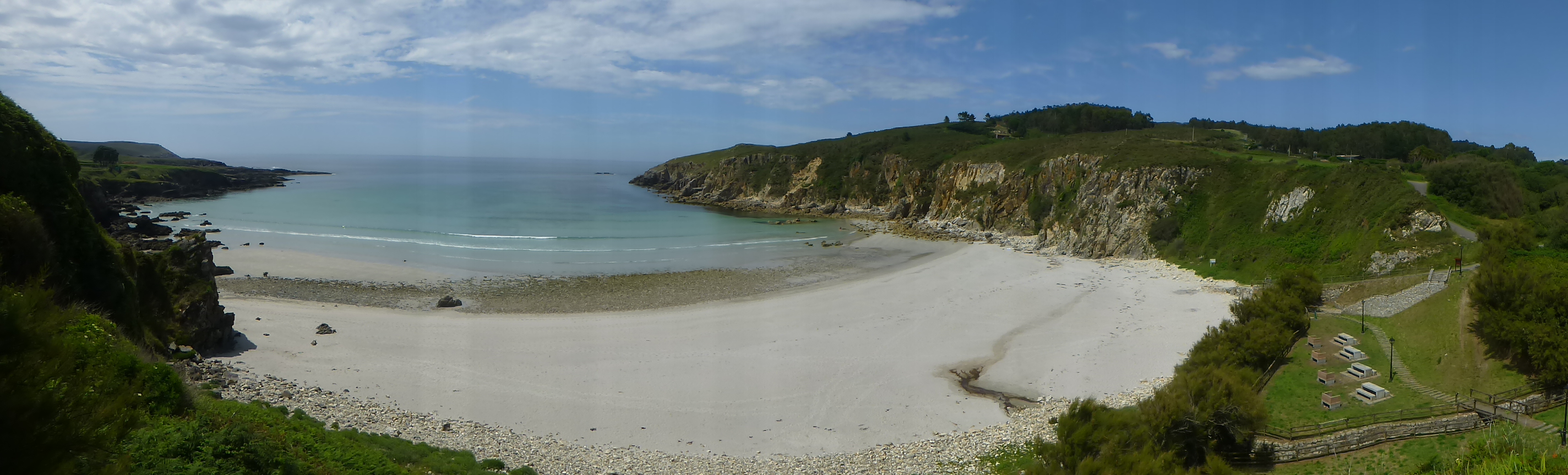 Playa de Beo, Malpica de Bergantiños, A Coruña, Galicia, España.